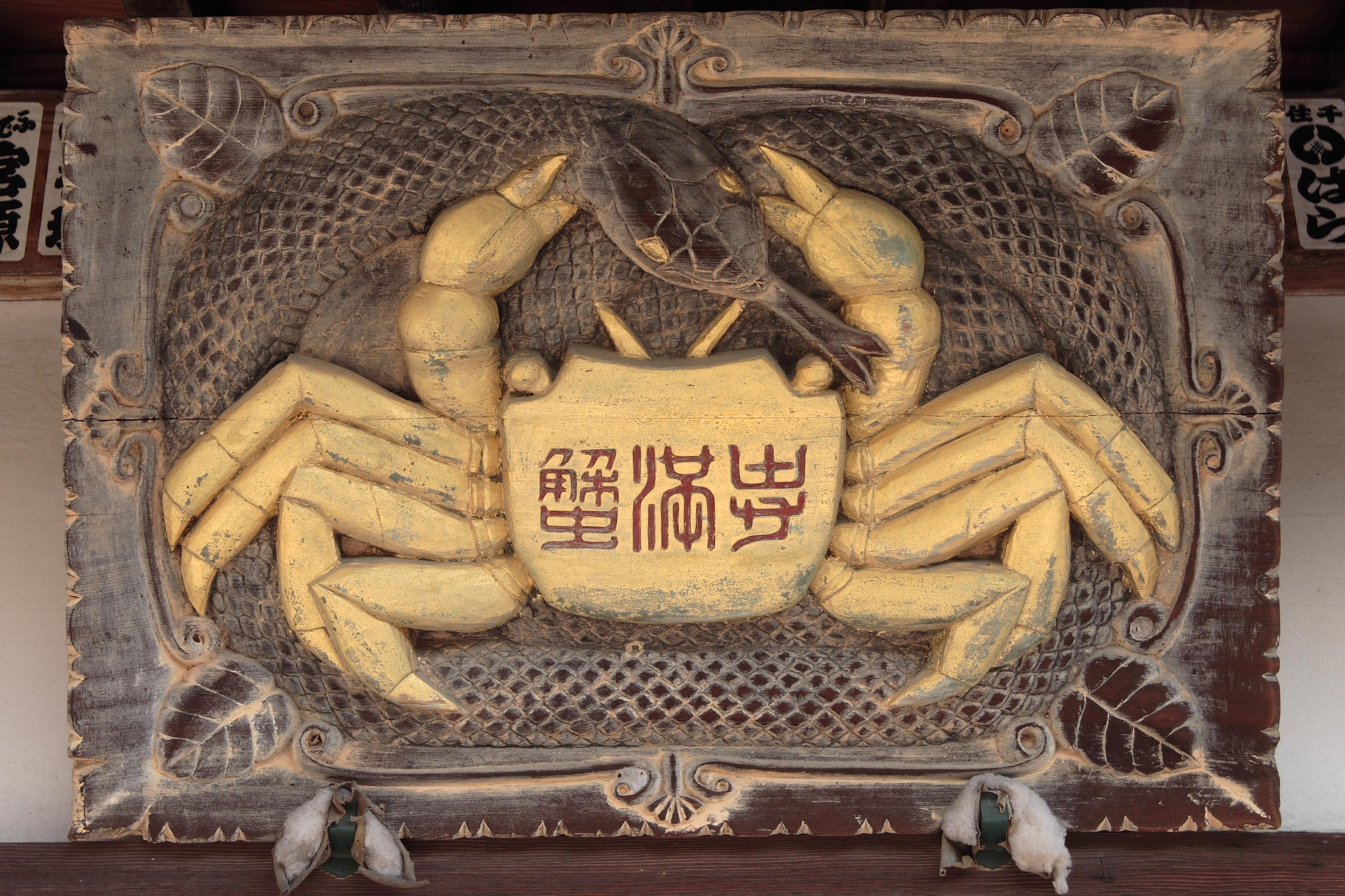 蟹満寺 (かにまんじ/Kanimanji) (Kyoto prefecture, Japan)